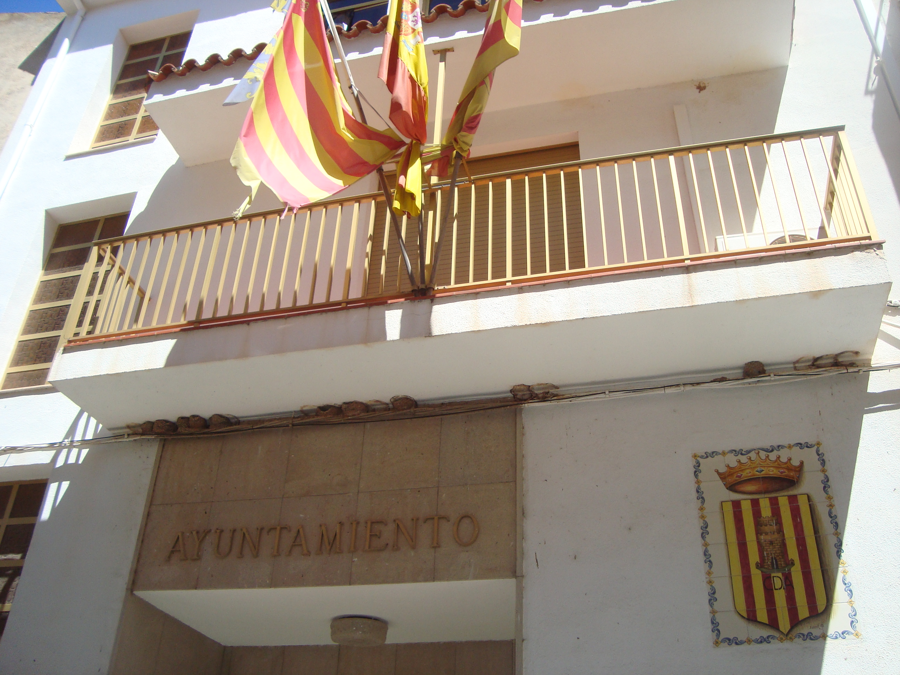 Ayuntamiento de Figueroles (Castellón)